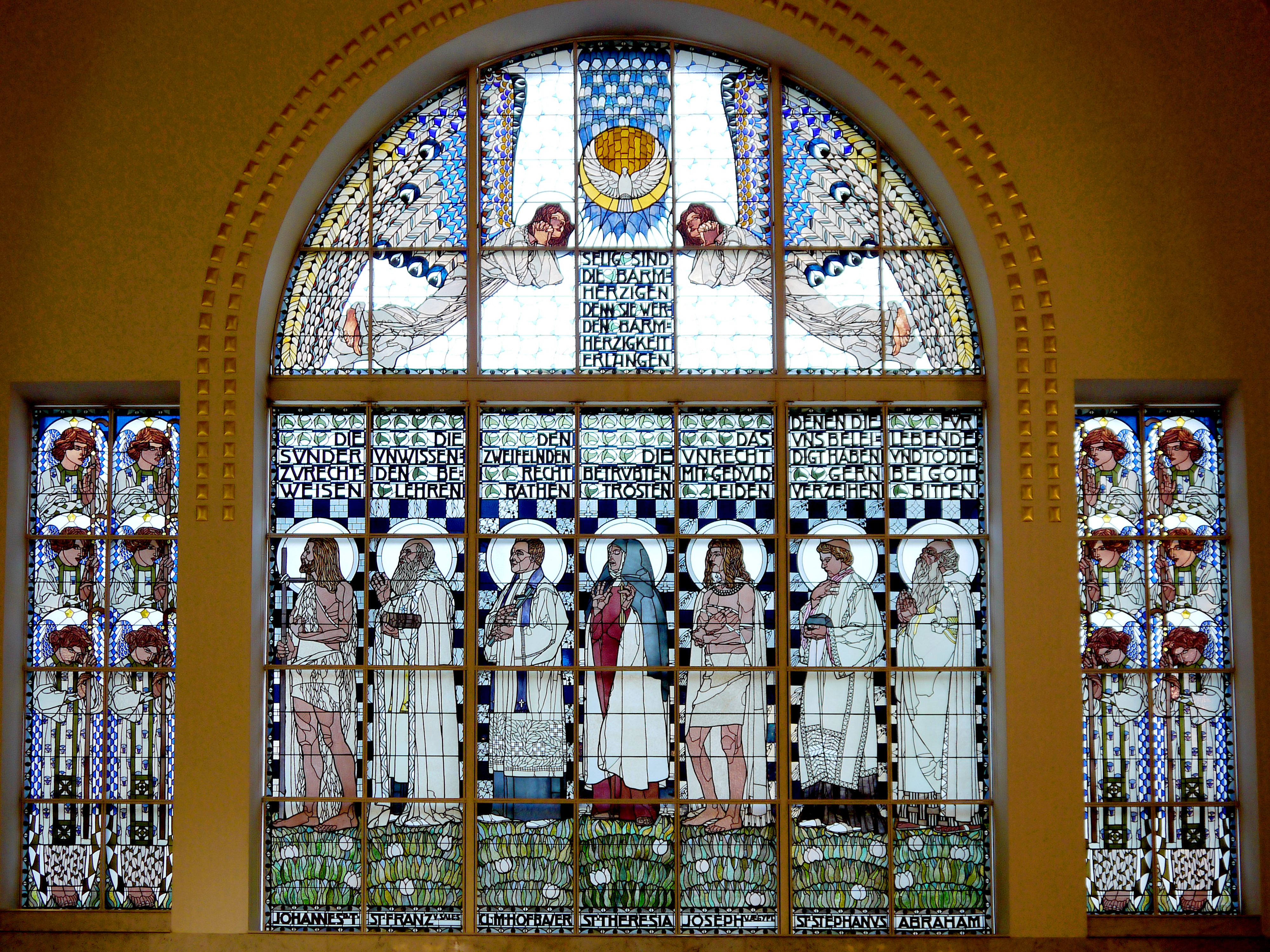 geistige Tugenden